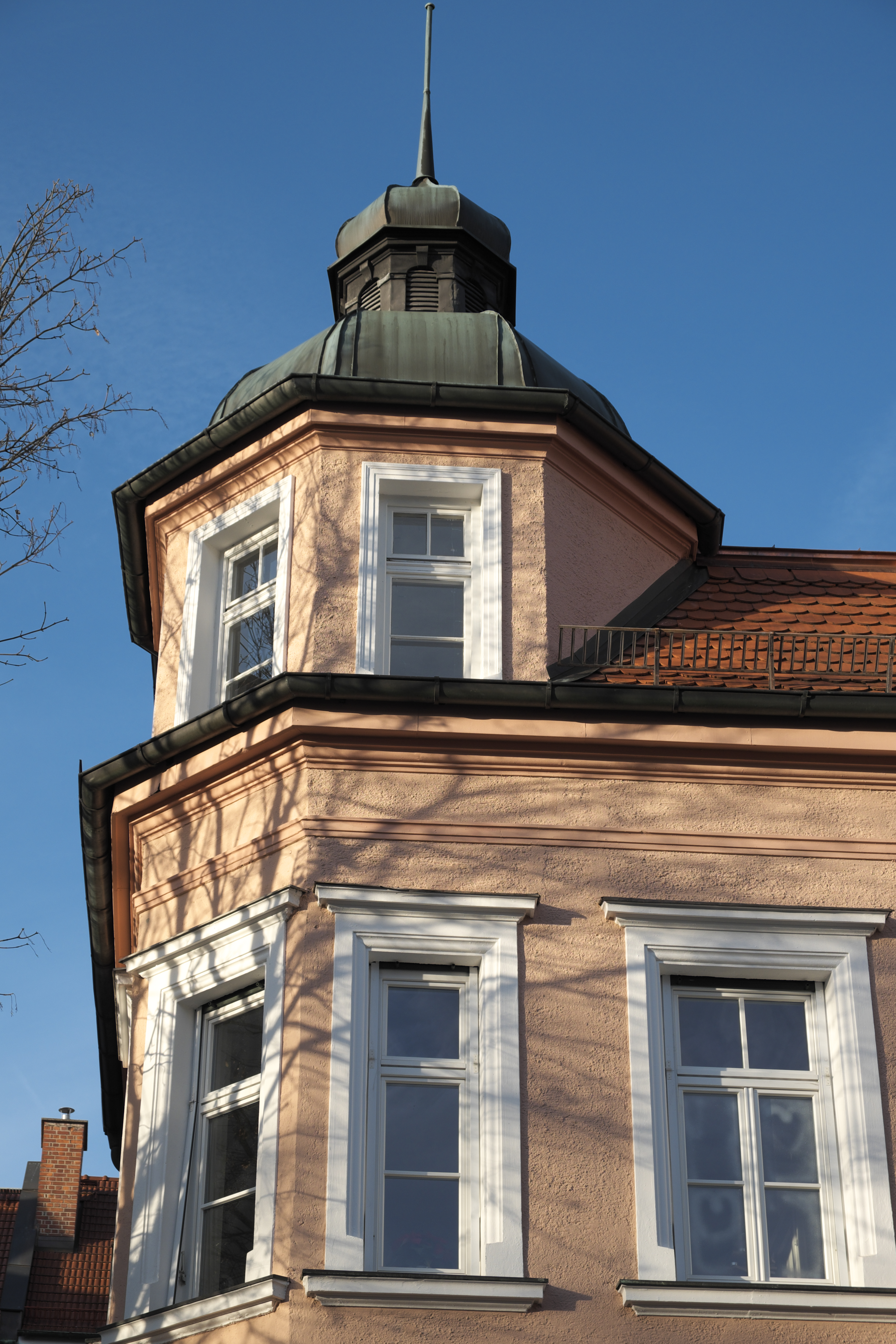 Mietshaus in der Bothmerstraße 1 in Neuhausen im Stadtbezirk Neuhausen-Nymphenburg in München (Bayern/Deutschland)